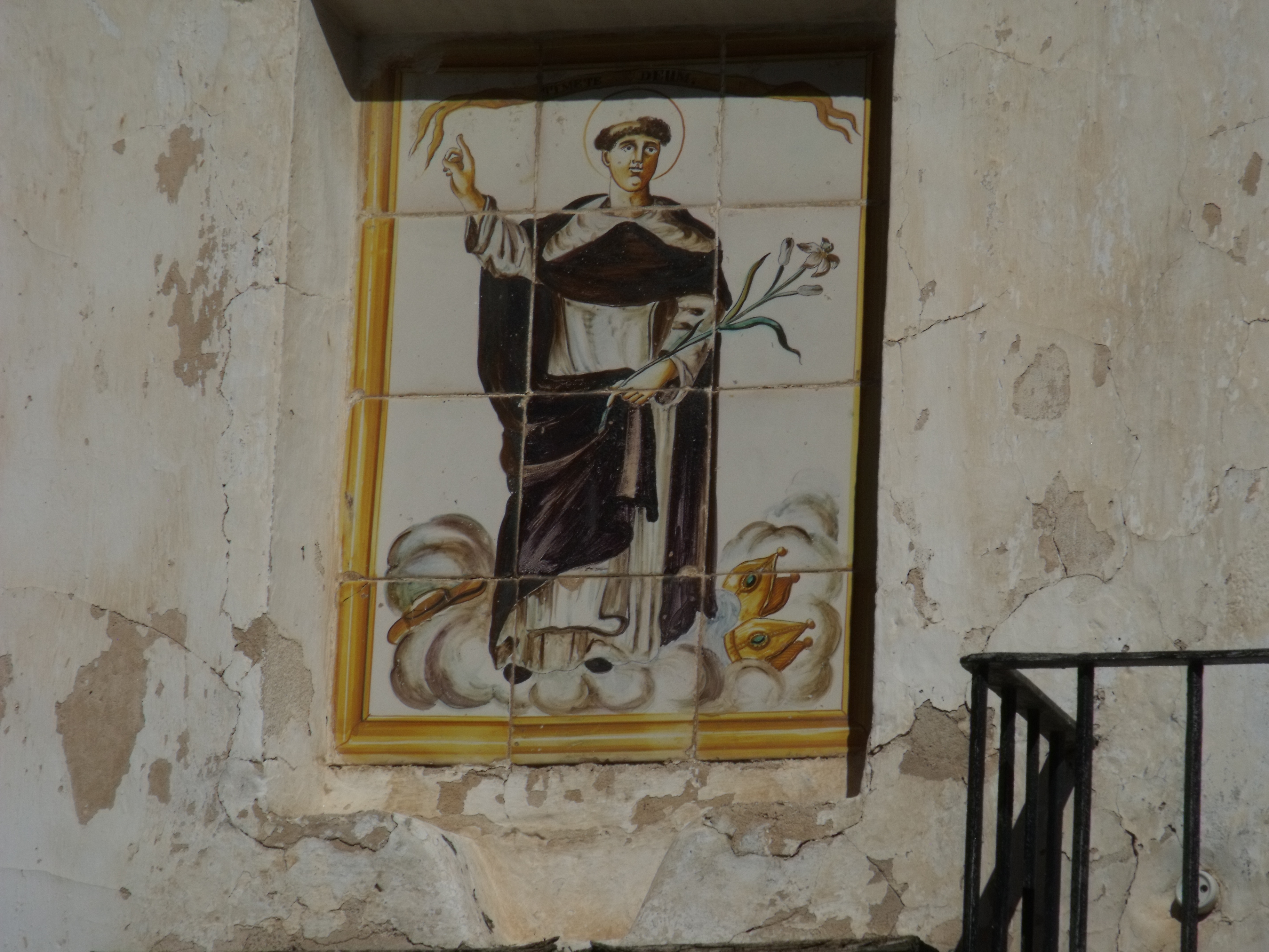 Casas de la calle Olba, Valencia. Imagen de San Vicente Ferrer, sobre una nubecilla, con hábito de dominico. Con el dedo índice de la mano derecha señala la filacteria, donde figura su lema Timete Deum. Es un rectángulo vertical de 0,8 por 0,6 metros, formado por doce piezas de cerámica de 0,2 metros de lado. Su datación aproximada es de 1924. Viene descrito en el Catálogo de Bienes y Espacios Protegidos de Naturaleza Rural del Ayuntamiento de Valencia, ficha EPA_SU_05.02.